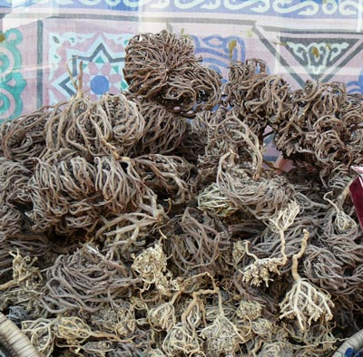 Anastatica hierochuntica, kleinere Exemplare (wg. unterschiedlicher Färbung Unterart?)